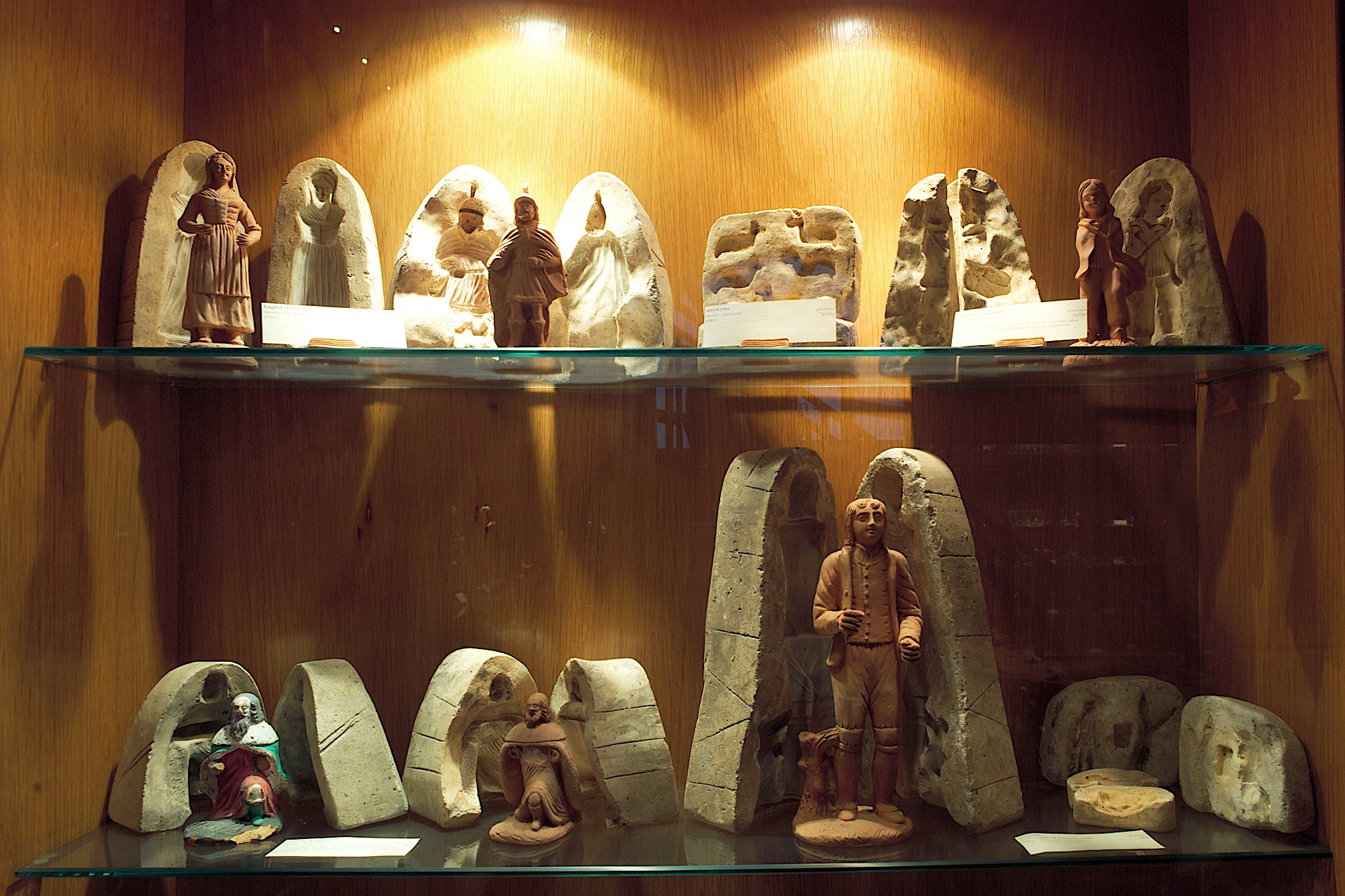 Moule de Jean-Louis Lagnel (1764-1822), premier santonnier Marseillais. Musée Marcel Carbonel (collection privée marcel Carbonel).